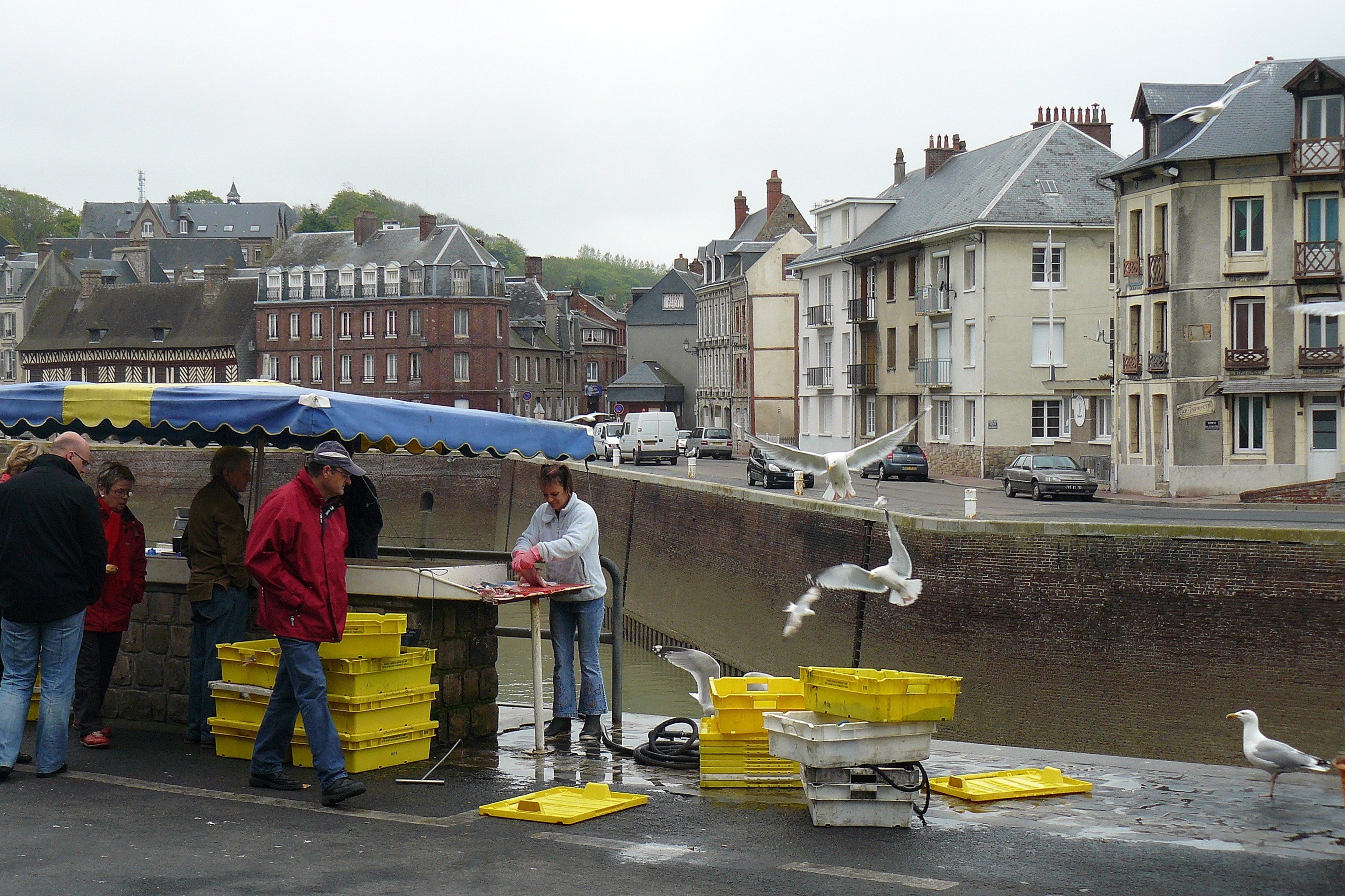 La vente du poisson sur le Quai d'Amont à Saint-Valery-en-Caux (Seine-Maritime, France)